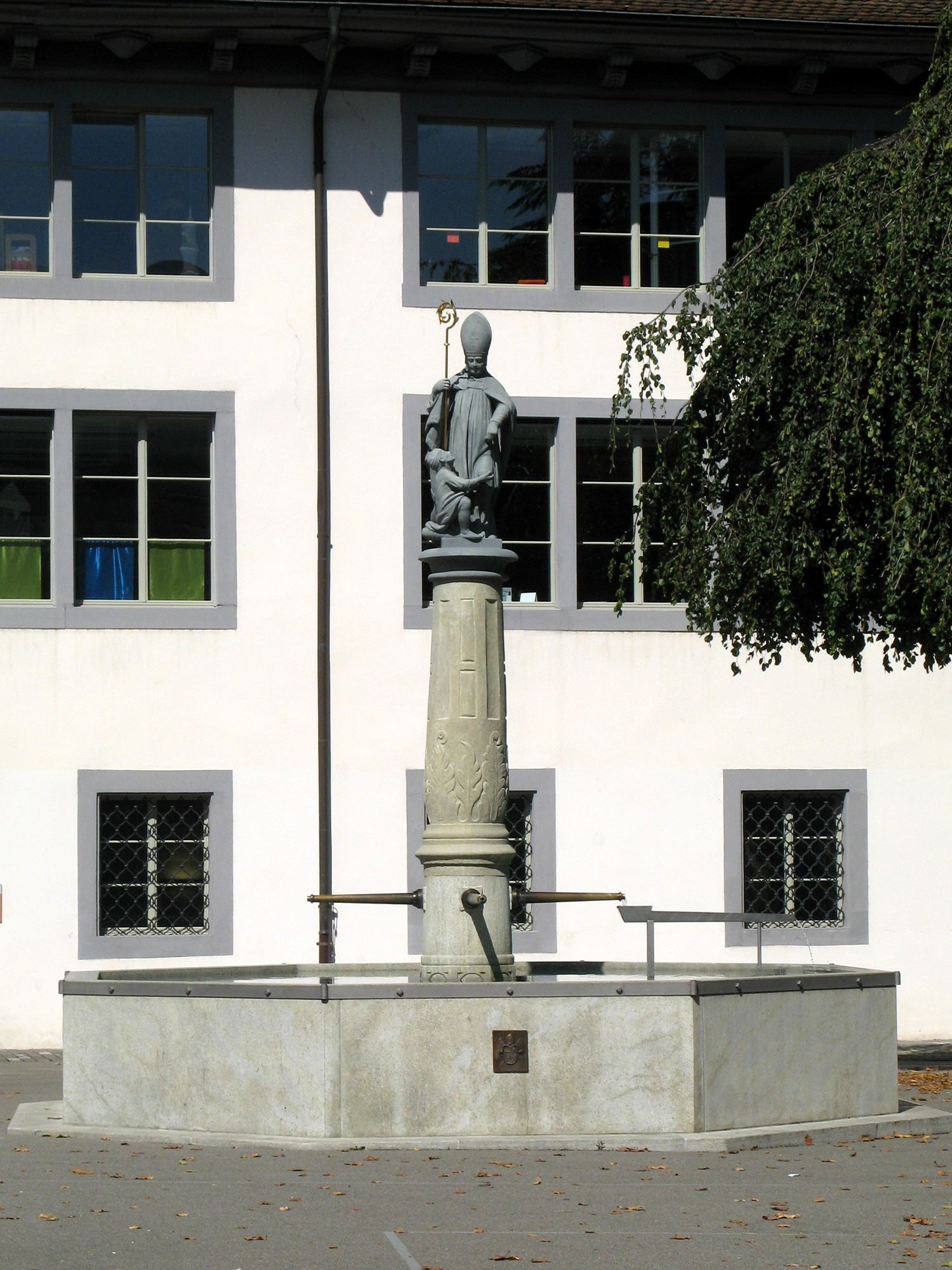 Martinsbrunnen vor dem Kloster Muri